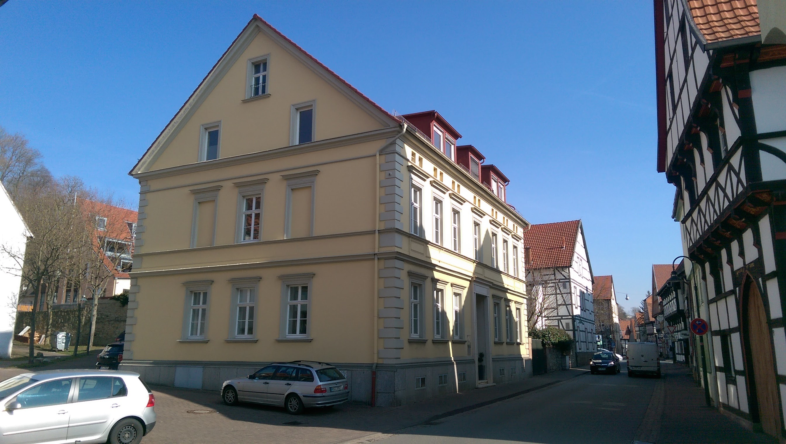 Warburg, Klockenstraße 8 (ehem. Brauns-Heitmann)